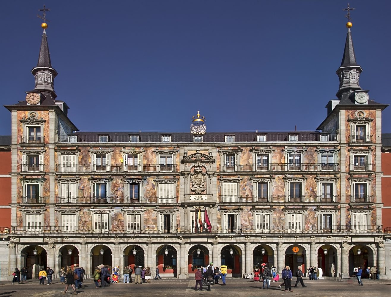 Con motivo de la celebración del 400 aniversario de la Plaza Mayor de Madrid el ayuntamiento, a través del Área de Turismo de Madrid Destino, organiza la visita guiada “Madrid y el IV Centenario de la Plaza Mayor”. Un recorrido especial para descubrir la historia y transformación de este icono madrileño y eje socio-cultural de la capital, así como el entorno en el que se ubica.